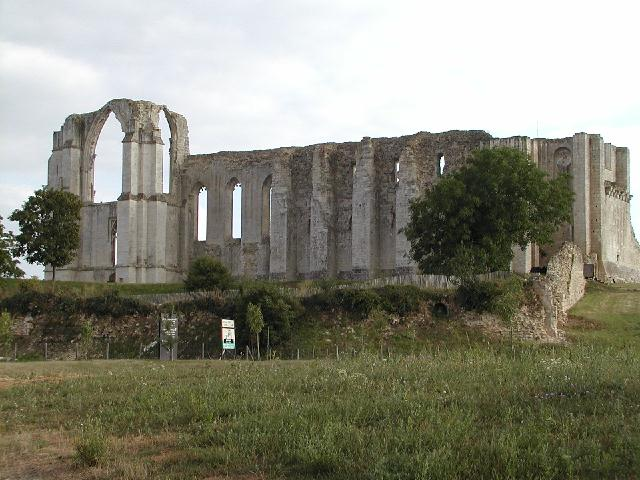 Abbaye de Maillezais